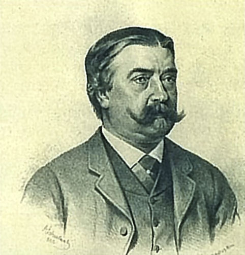 Karl Freiherr von Hasenauer, picture around 1880